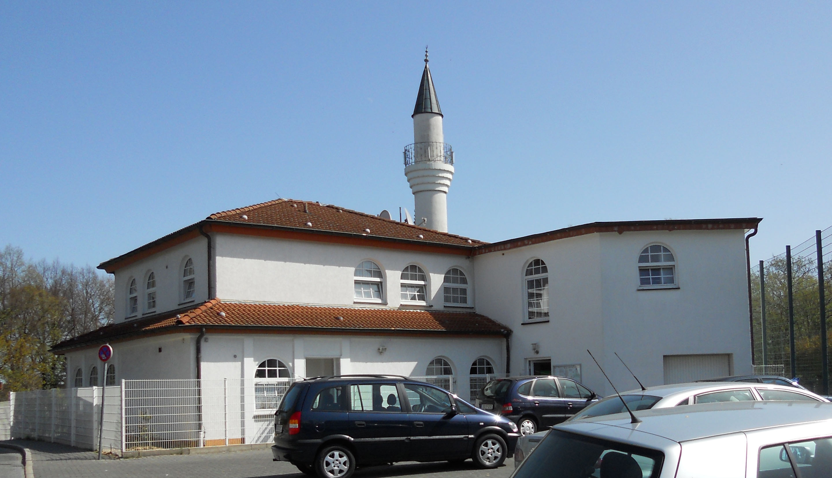 Moschee in Werl, türkisches Gotteshaus mit Minarett